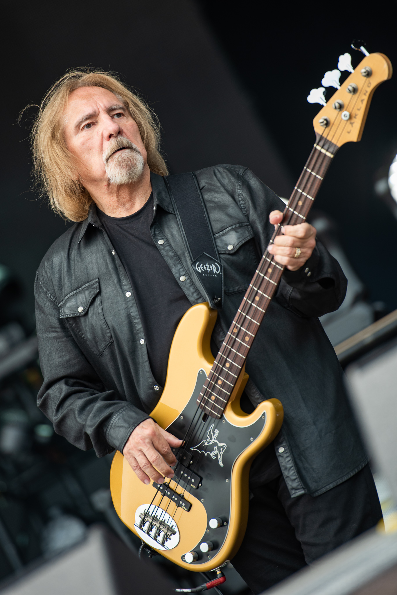 ARGO-Konzerte,Deadland Ritual,Geezer Butler,Konzert,Livekonzert,Livemusik,Musik,RiP,Rock im Park 2019,Zeppelin Stage